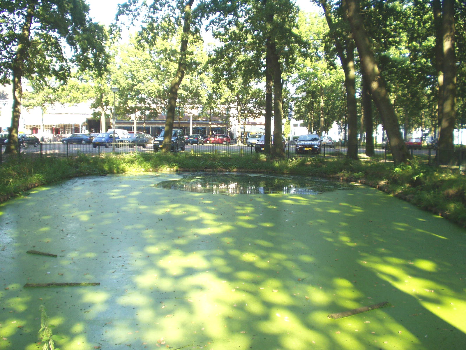 Brândobbe op de Grutte Brink yn Súdlaren yn 2005.